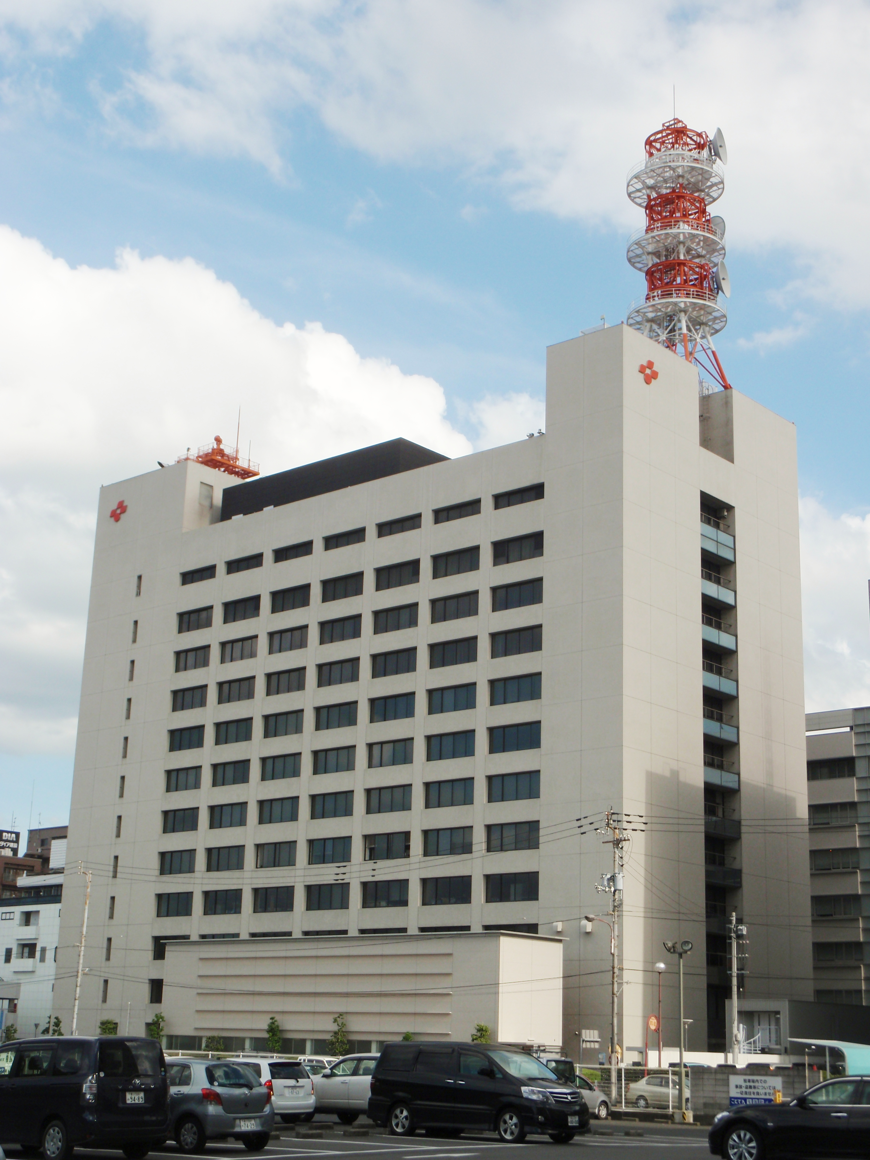 香川県高松市丸の内にある四国電力本社。